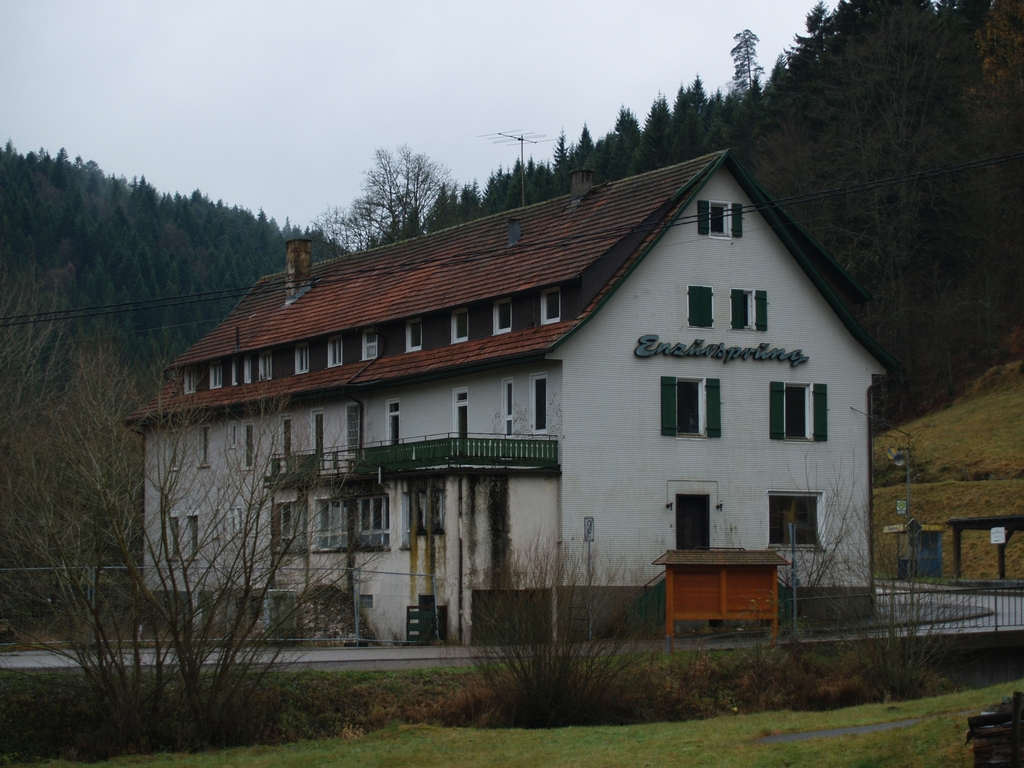 Verlassener Gasthof Enzursprung in Gompelscheuer (Gemeinde Enzklösterle, Landkreis Calw)